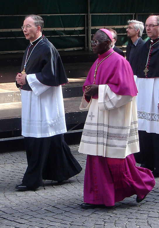 Hoogeerwaarde Heer Kanunnik Koen Vanhoutte, President van het Grootseminarie (L) met Mgr. Robert Sarah (M), Secretary of the Congregation for the Evangelization of Peoples (2009)